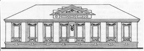 Беларуская (тарашкевіца): Магілёўскай духоўнай семінарыі будынкі. Дом для рэктара і прэфекта. Чарцёж